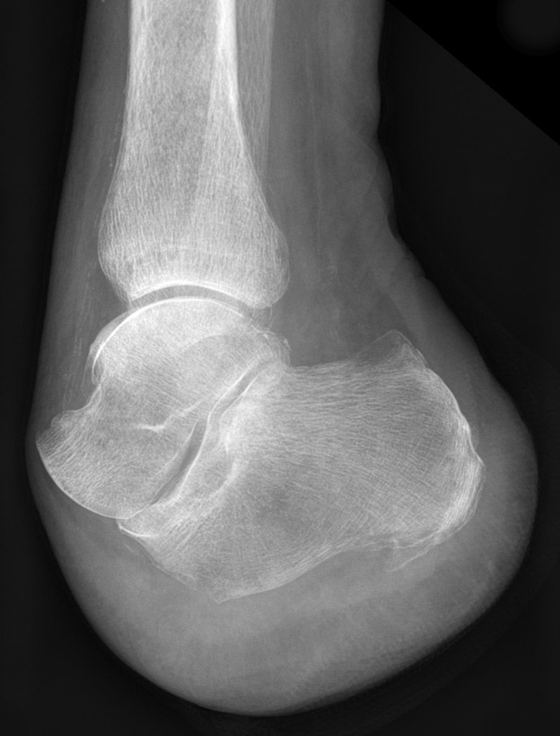 Röntgenbild in seitlichem Strahlengang eines Fußes nach Amputation in der Chopart-Linie (Articulatio tarsi transversa)